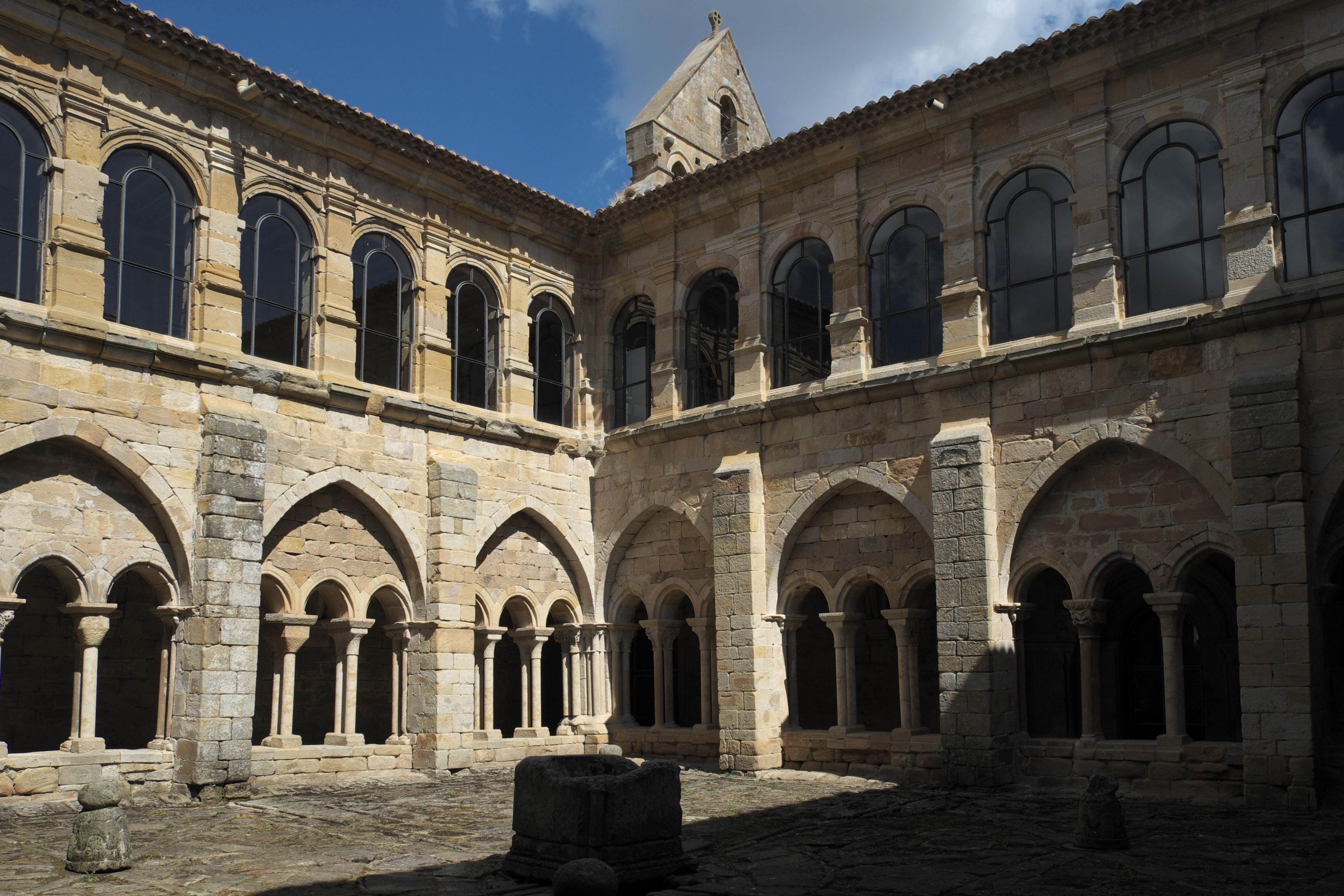 Kreuzgang des ehemaligen Prämonstratenserklosters Santa María la Real in Aguilar de Campoo in der Provinz Palencia (Kastilien-León/Spanien)